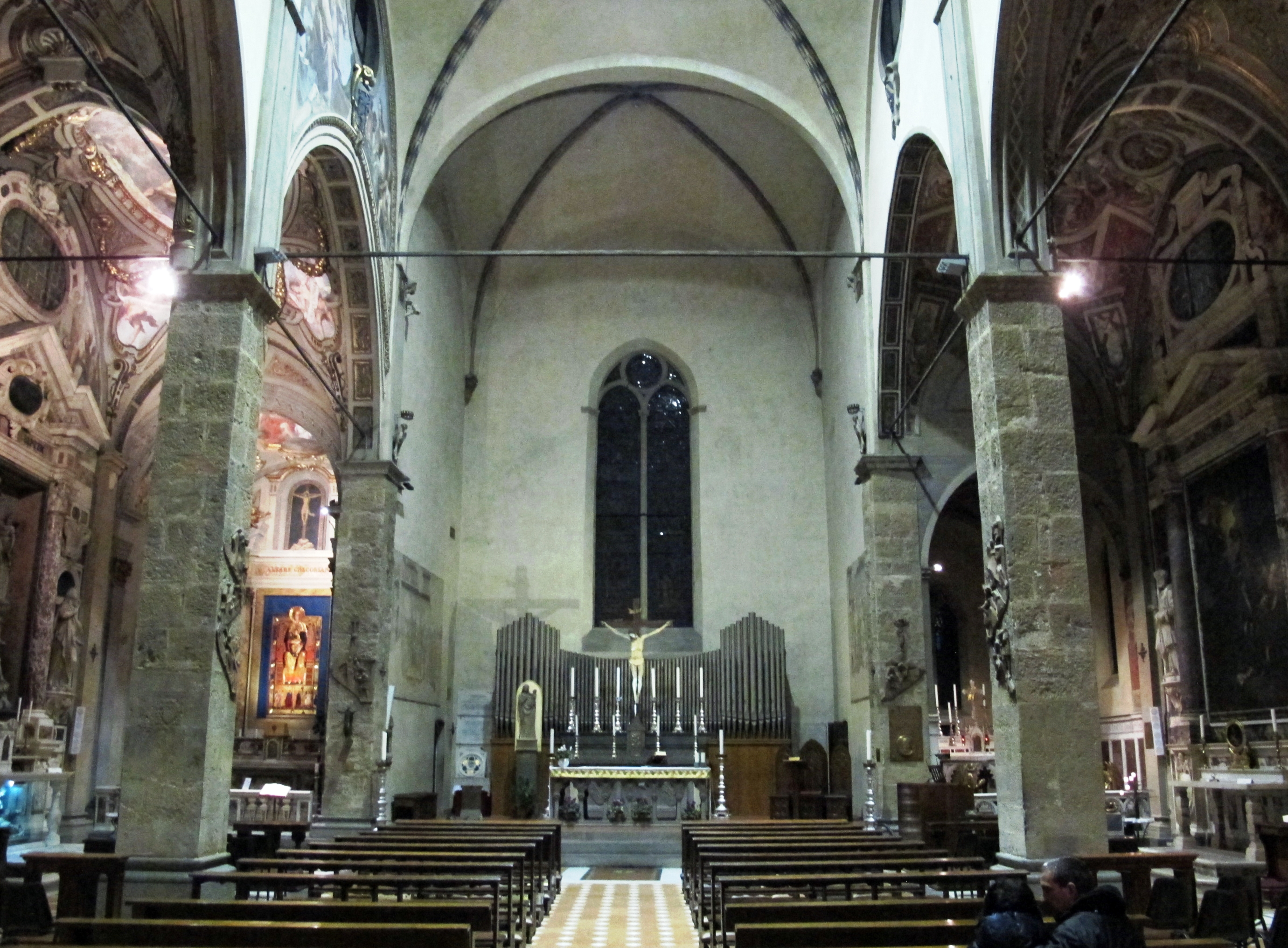 S.m. maggiore, interno